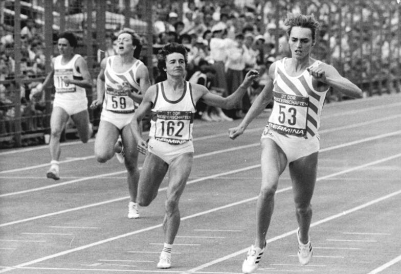 Heike Drechsler, Silke Gladisch, Sabine Rieger ADN-ZB Kluge 29.6.86 Bez. Gera: DDR-Leichtathletik-Meisterschaften in Jena- Die Weitsprung-Weltrekordlerin Heike Drechsler (r.) vom SC Motor Jena egalisierte am dritten Tag der Meisterschaften den 200-m-Weltrekord von Marita Koch in 21,71 s. Zweite wurde Silke Gladisch (Nr. 162, 2.v.r.), mit der Nr. 59 Sabine Rieger (3.v.r.).